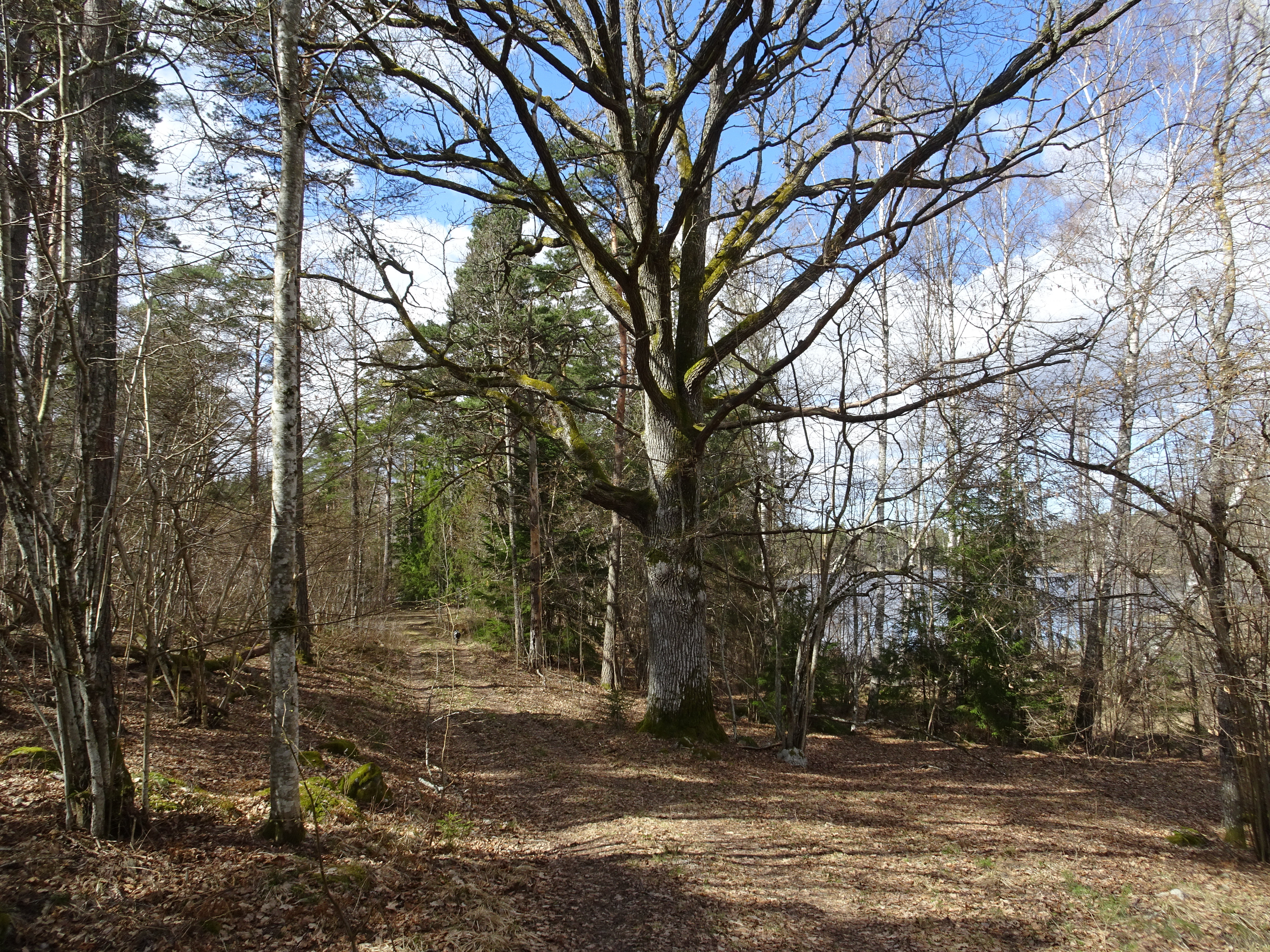 Vackstaskogens naturreservat